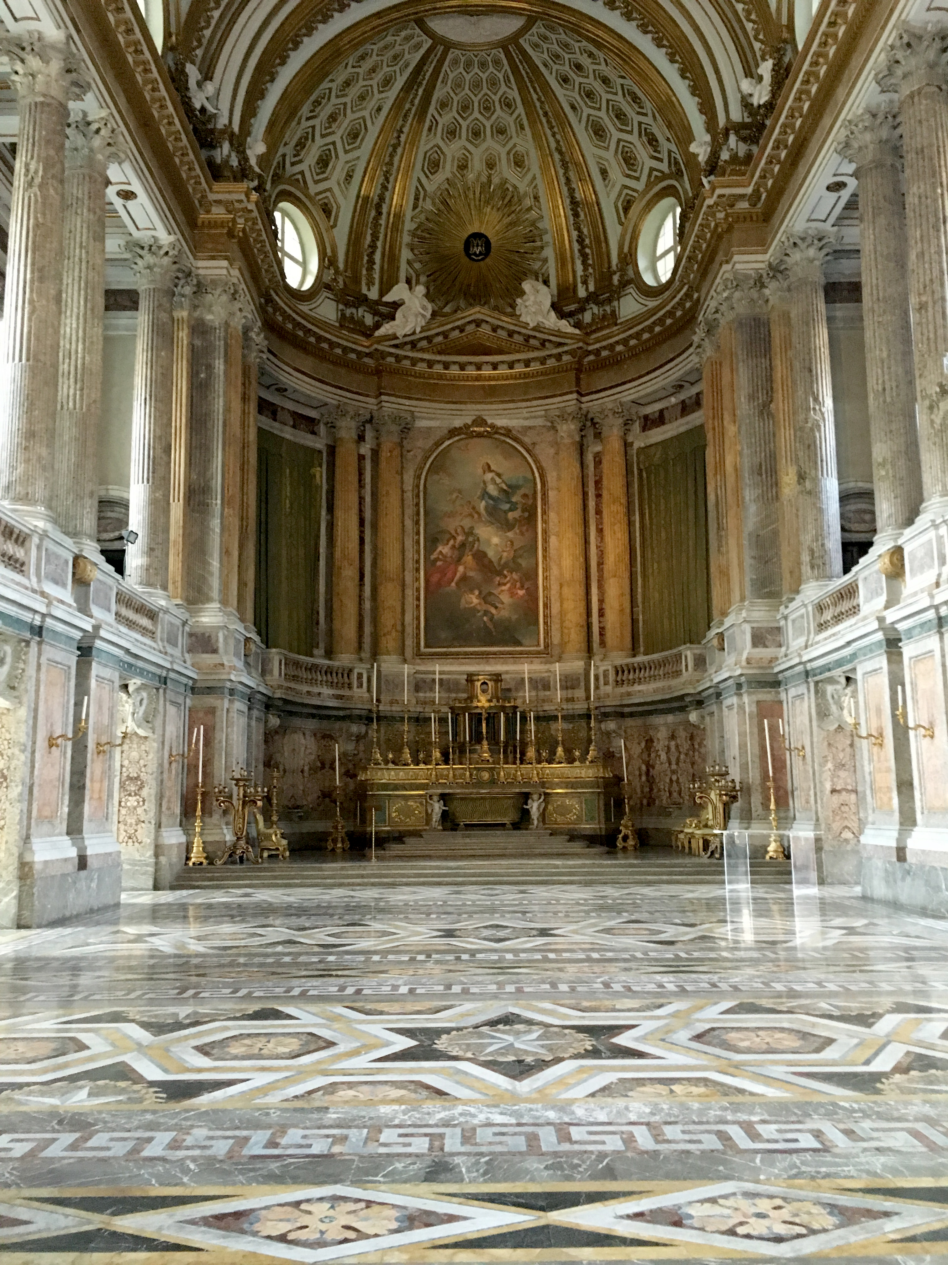 Chiesa nella parte interna della Reggia di Caserta.